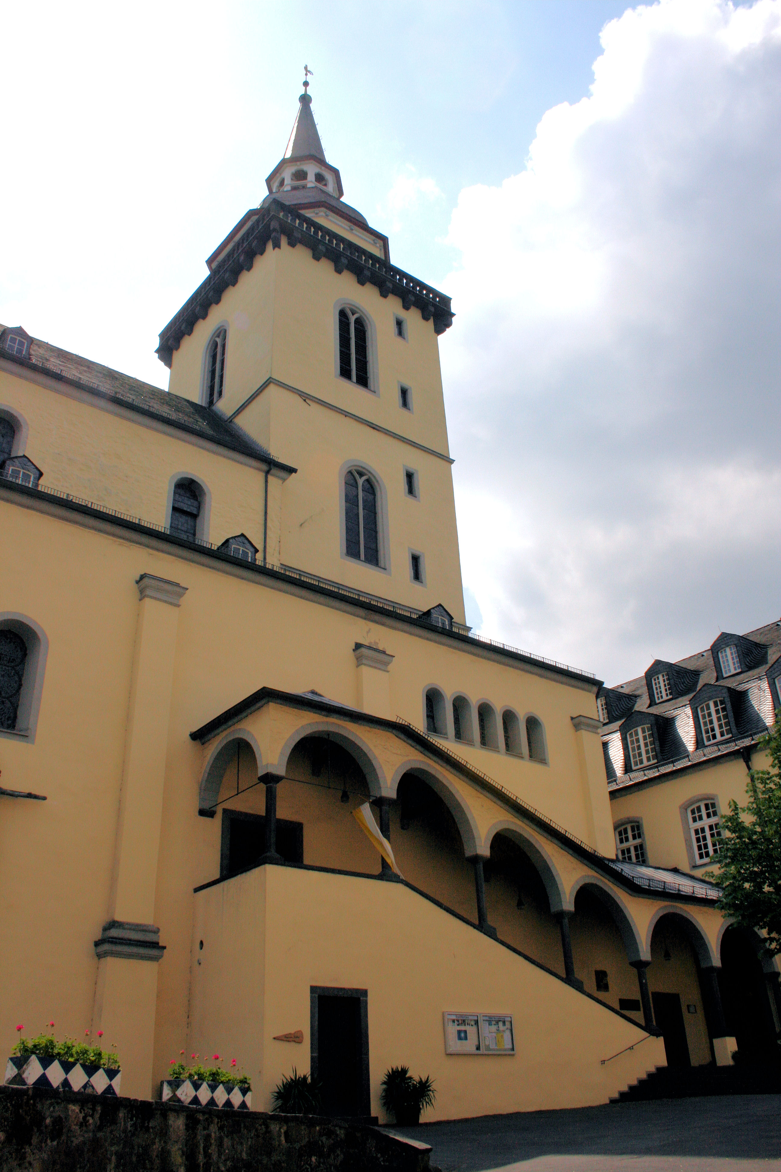 Abteikirche Michaelsberg, Siegburg